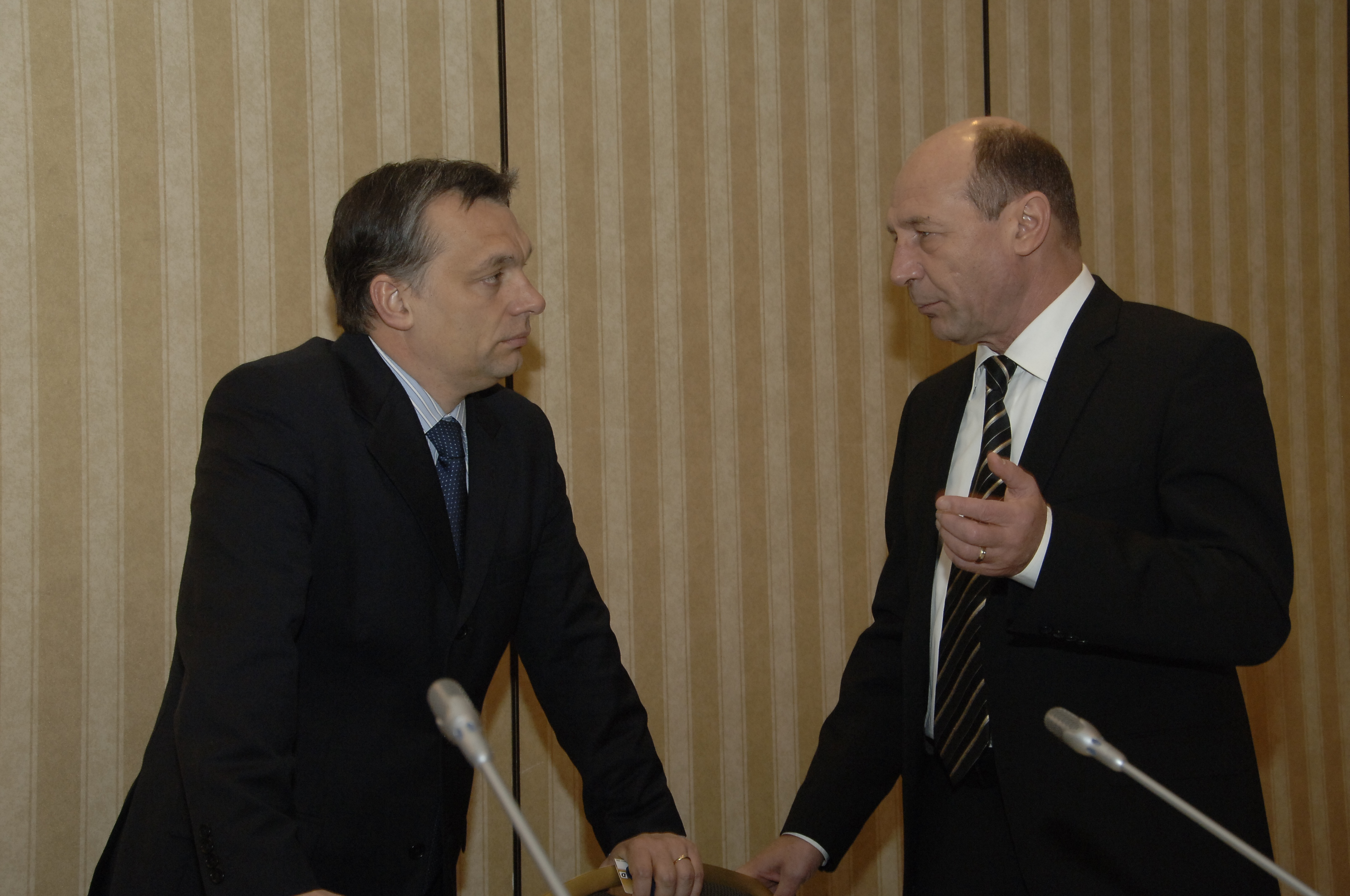 Orban-Basescu